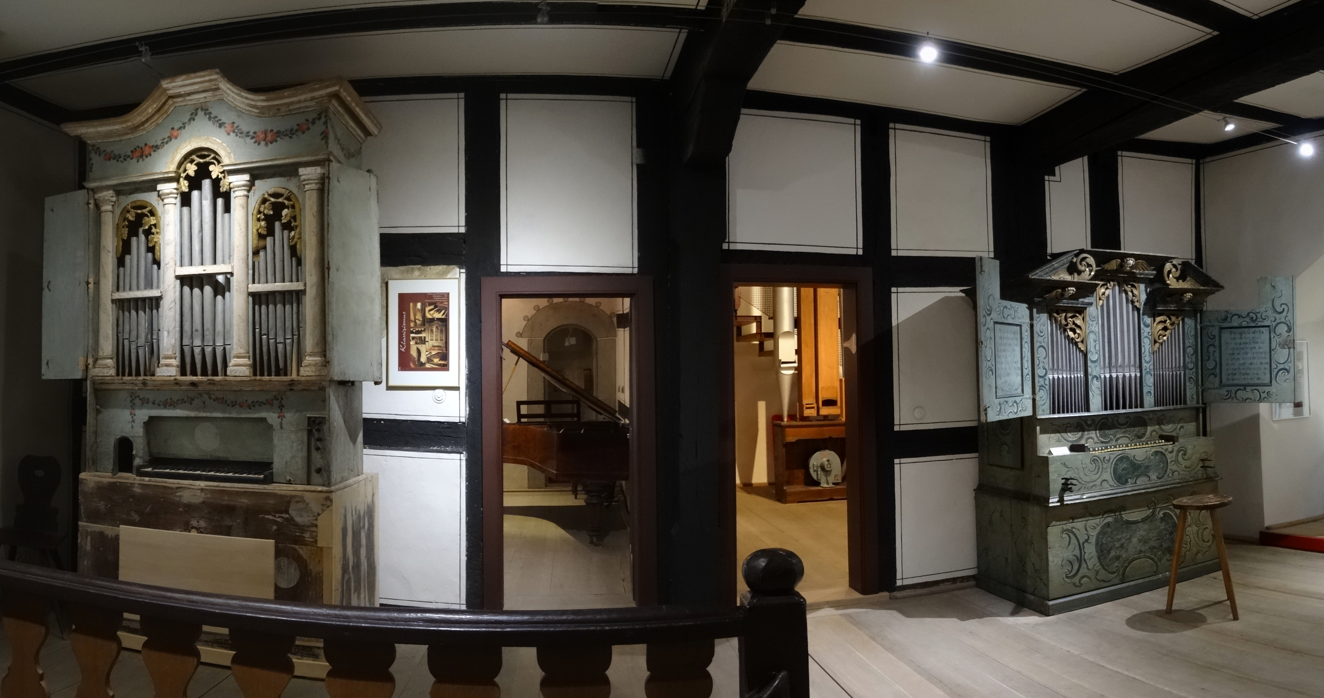 Im Orgelmuseum Schloss Hanstein, Ostheim vor der Rhön